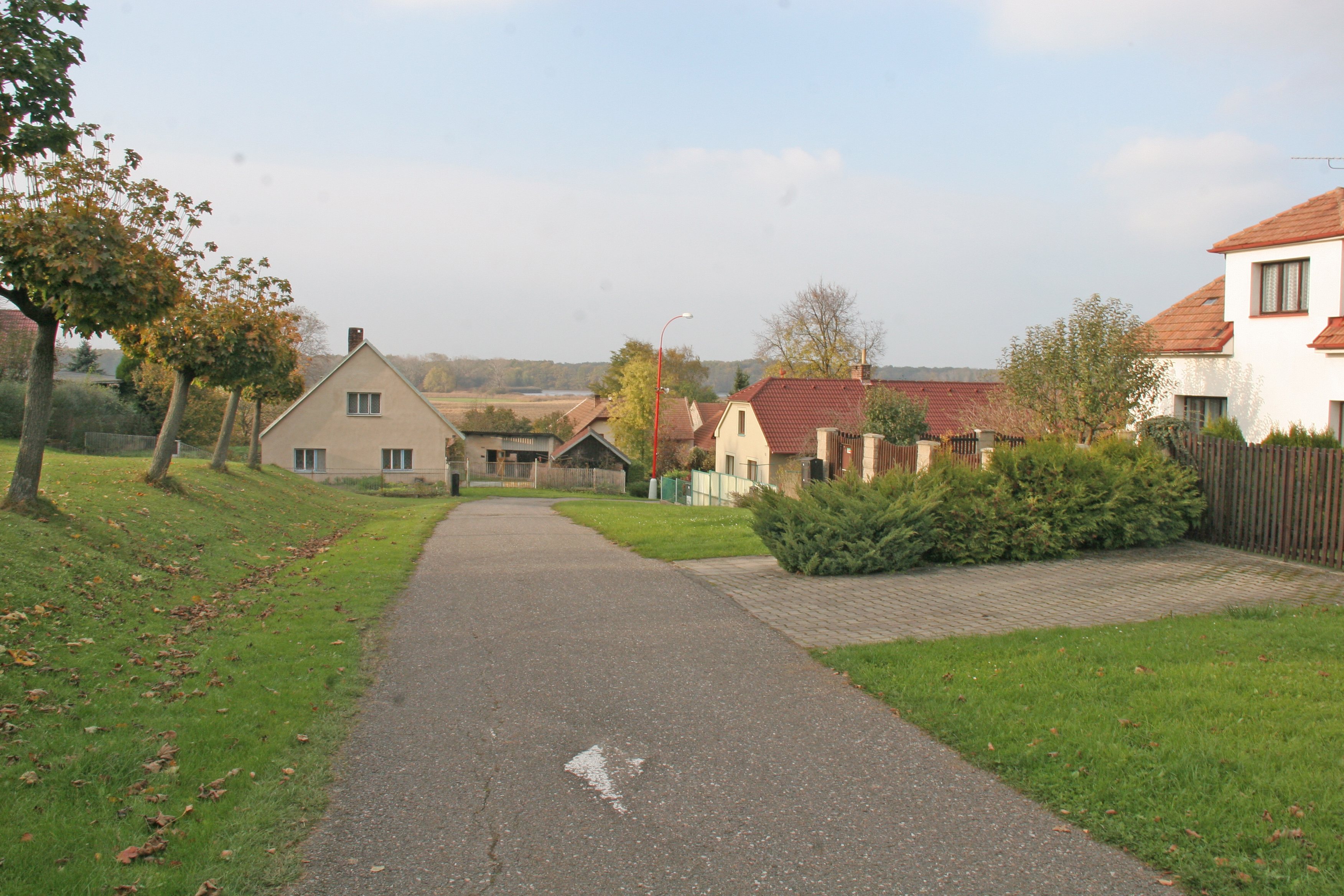 Trusnov čp. 56